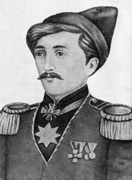 Bakihanov Abbasgulu Aga, Azerbaijani scientist